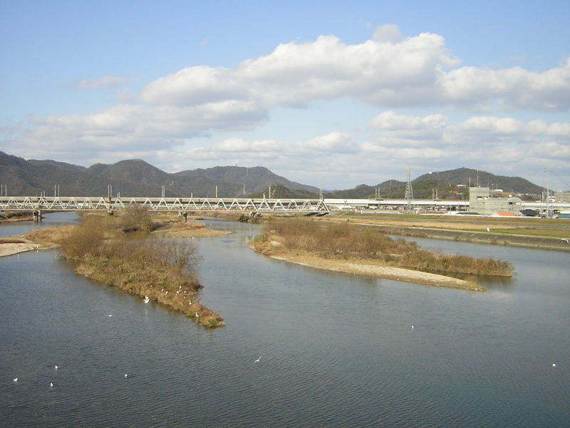 река Асида, префектура Хиросима, Япония